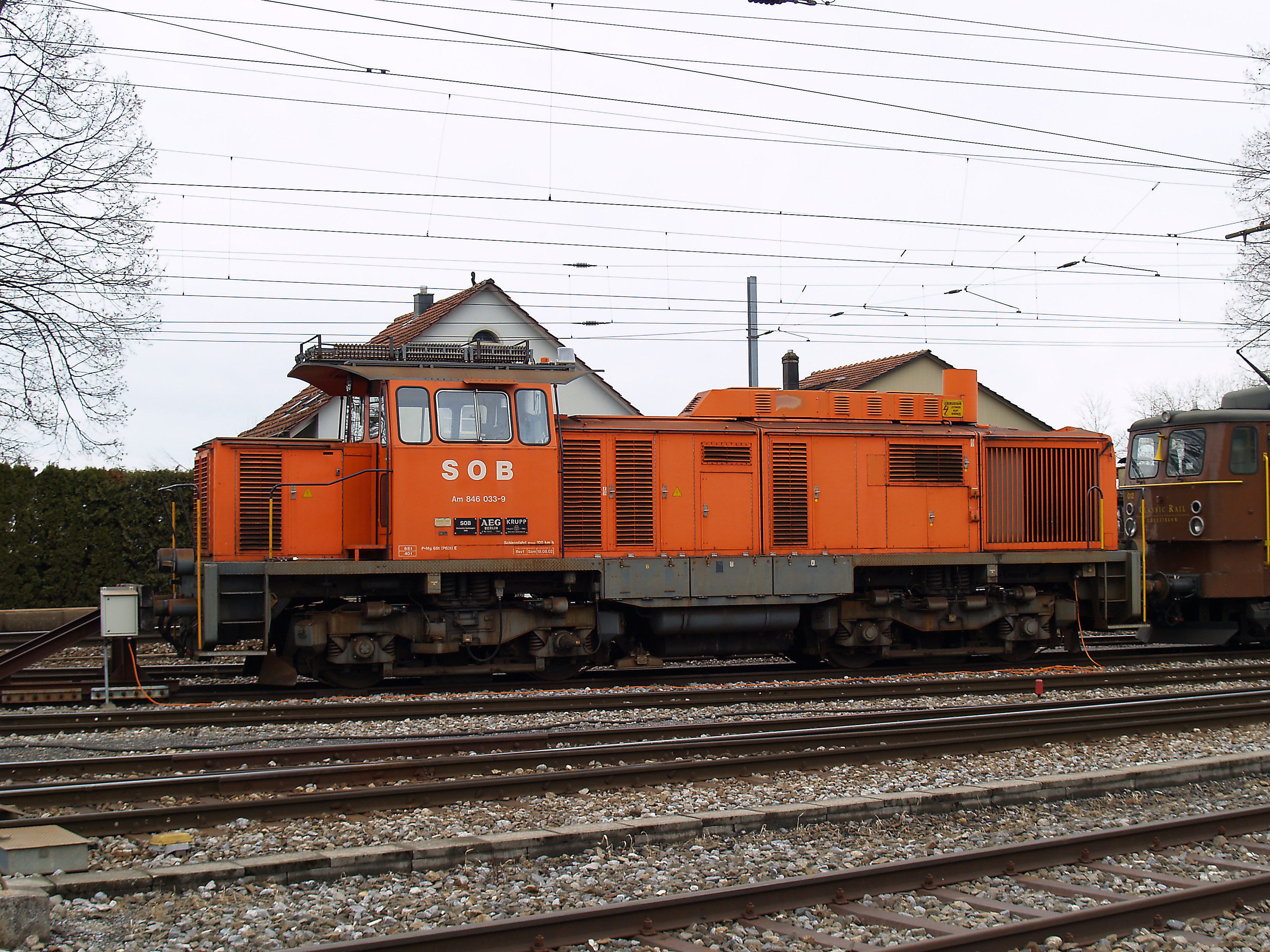 Diesellokomotive Am 846 033-9 der Schweizerischen Südostbahn in Samstagern